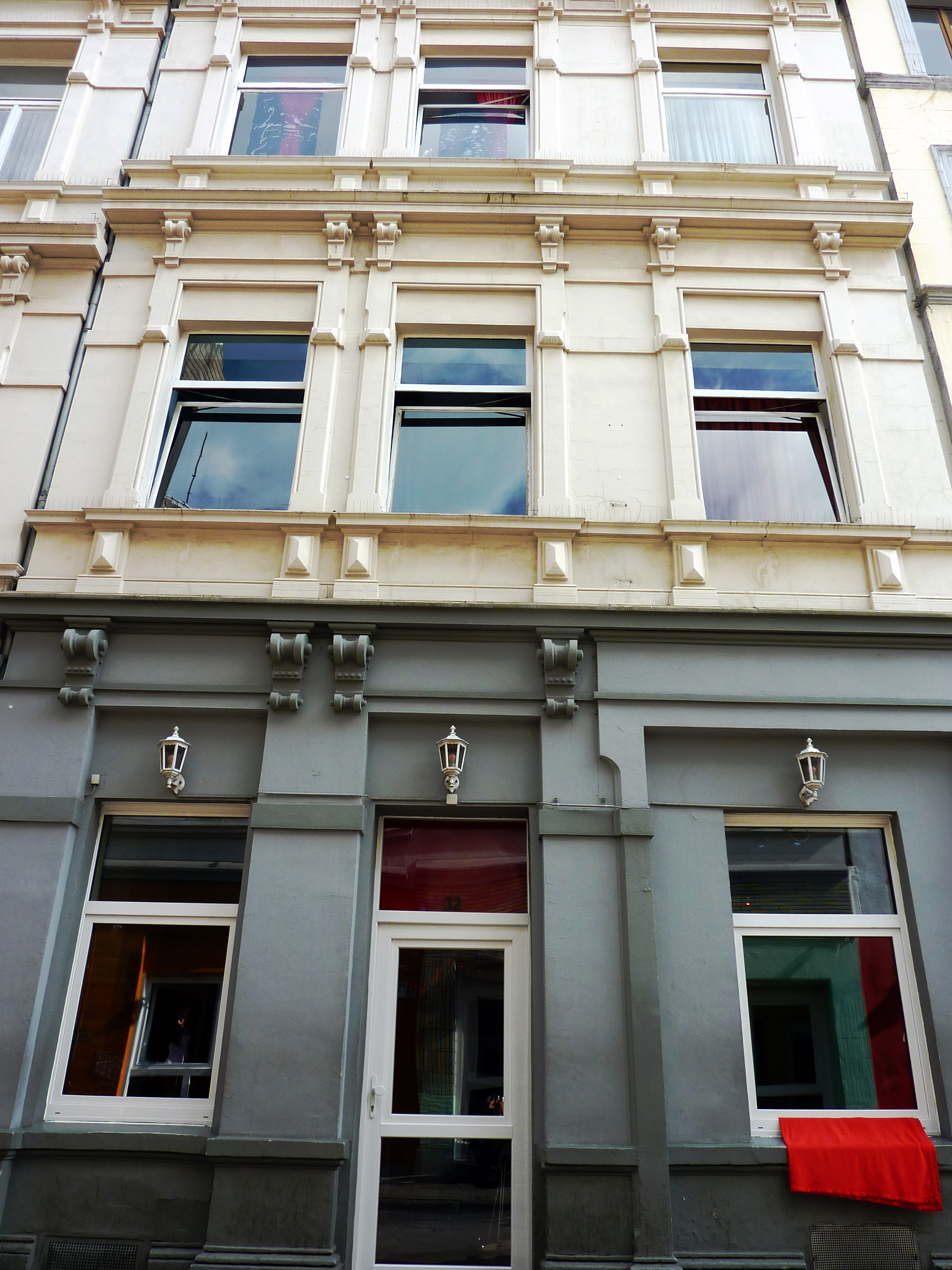 Baudenkmal Antoniusstraße 32This is a photograph of an architectural monument., no. 0